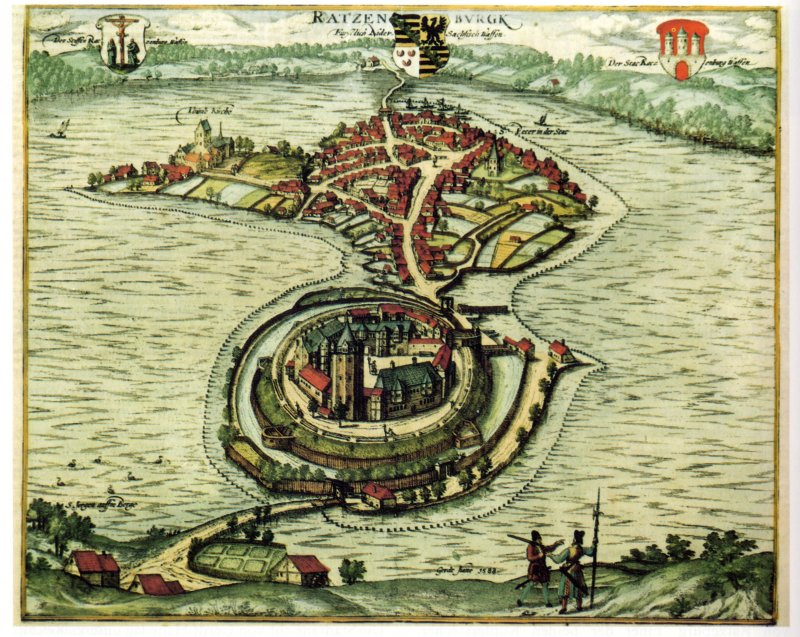 Ratzenburgk (Ratzeburg), 1588